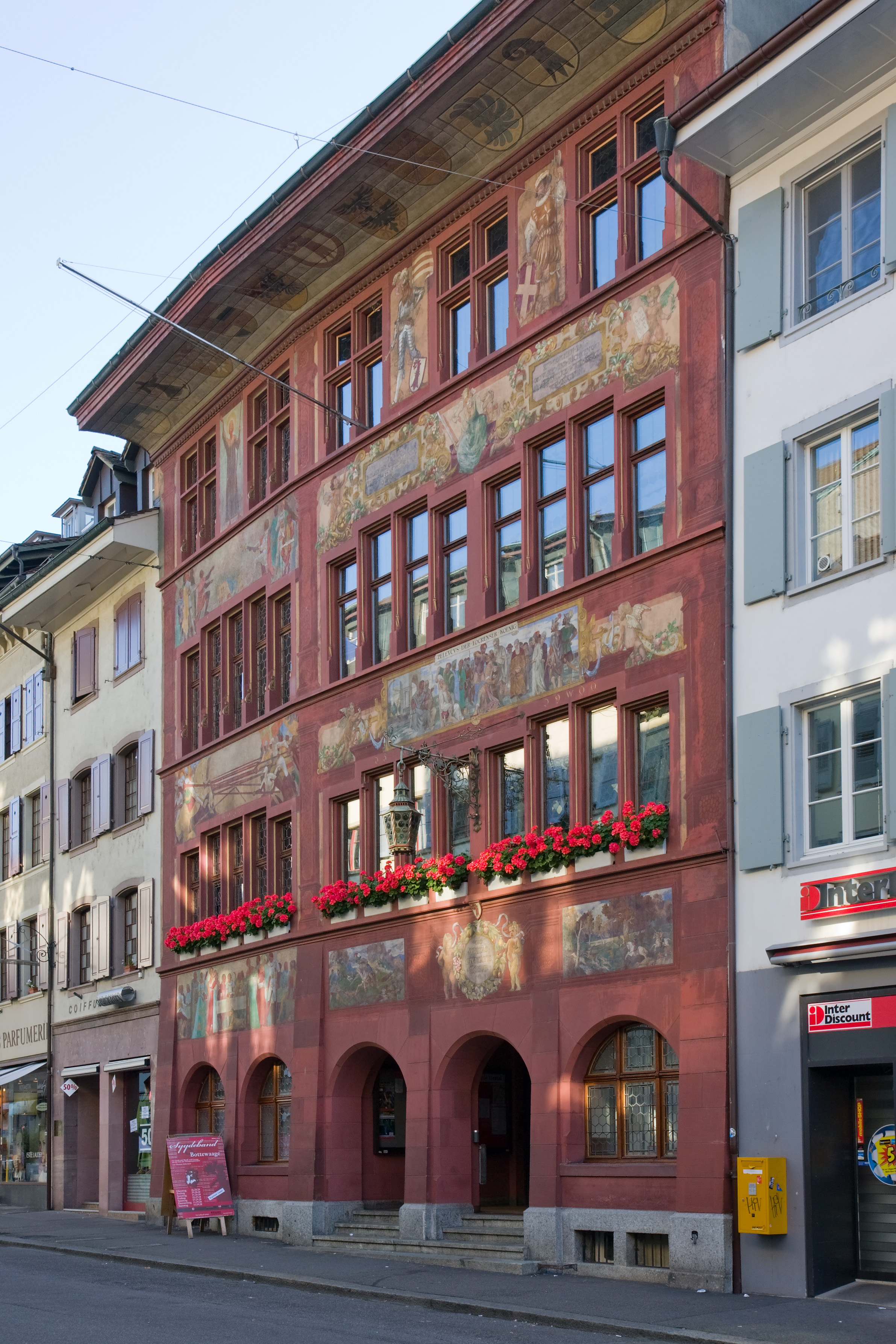 Altstadthaus in Liestal